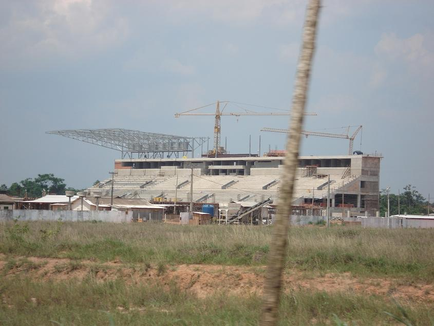 Foto tirada por mim, Davi Sopchaki do estádio estadual do Acre na capital Rio Branco